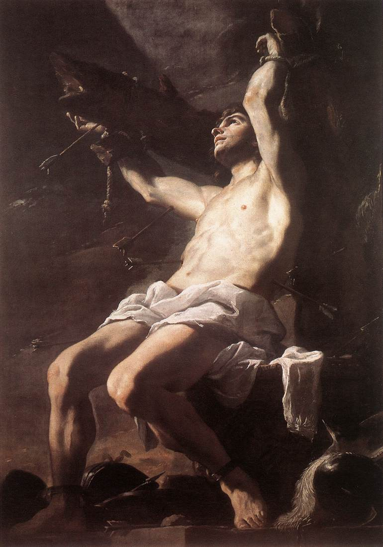 Il San Sebastiano di Mattia Preti, realizzato fra il 1653 e il 1656, è un quadro (olio su tela, cm 240 x 169) esposto a Napoli nel Museo di Capodimonte (inv. S.N.), nella Galleria Napoletana. Il dipinto, eseguito su incarico delle suore per la chiesa di San Sebastiano a Napoli, in sèguito a critiche e forti pressioni, fu infine rimosso e portato nella cappella privata di una famiglia nobile all'interno della chiesa di Santa Maria dei Sette Dolori (cui appartiene tuttora il dipinto), dove rimase fino al 1974, anno in cui la tela è stata trasferita al Museo di Capodimonte per motivi di sicurezza. Databile all'inizio del soggiorno napoletano, 1657 circa, la tela rivela lo studio della lezione caravaggesca, soprattutto della luce che lascia emergere dall'ombra corpi solidi torniti plasticamente, ma pittoricamente esaltati dall'uso di tonalità grigio-argentee. Lo scorcio trasversale conferisce alla composizione, insieme alla definizione dei piani luministici, potenza e dinamismo.